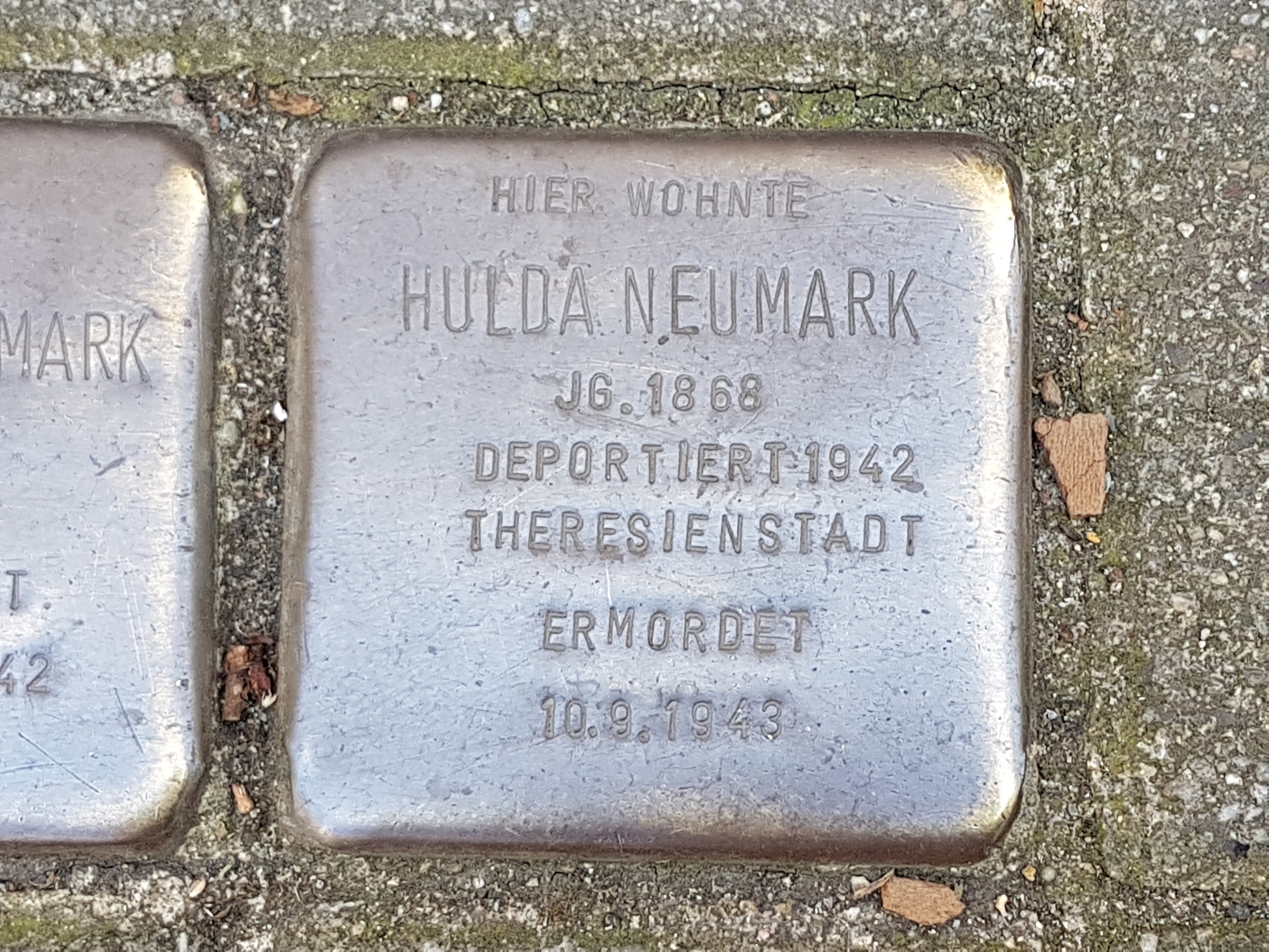 Stolperstein Duisburg